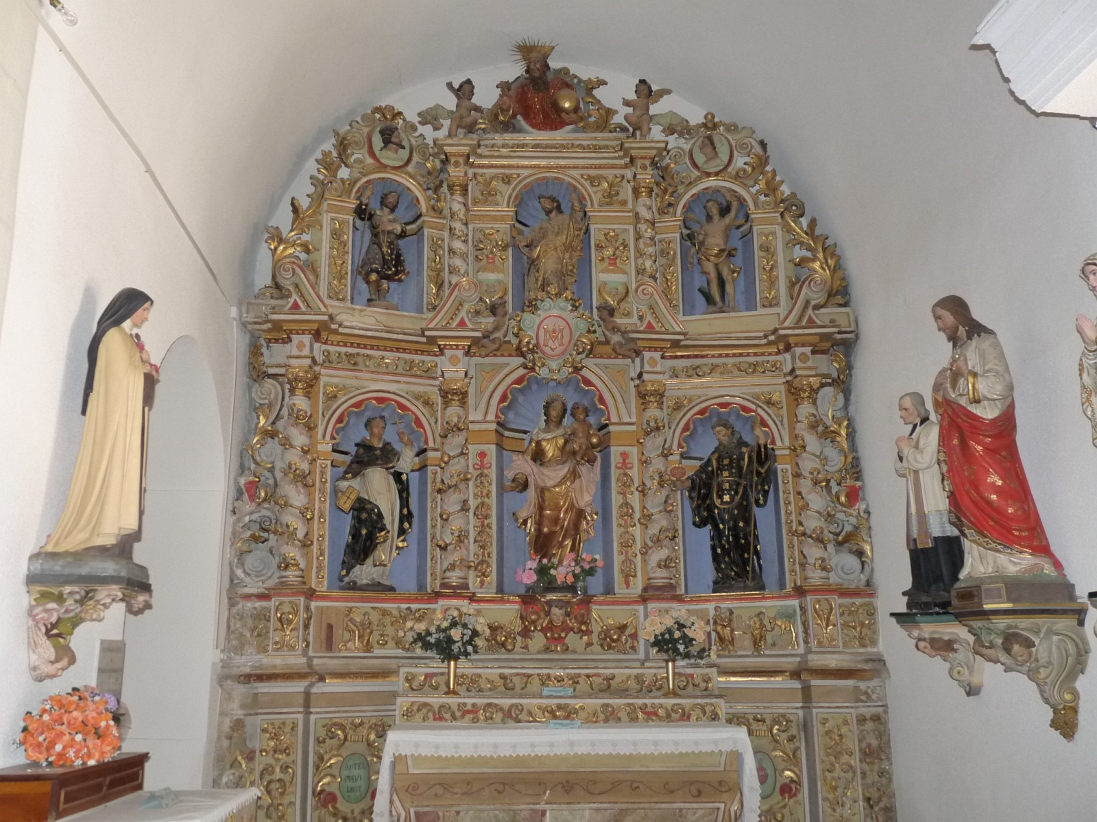 Autel latéral de l'église de Formiguères (Pyrénées-Orientales, France), retable du Rosaire.